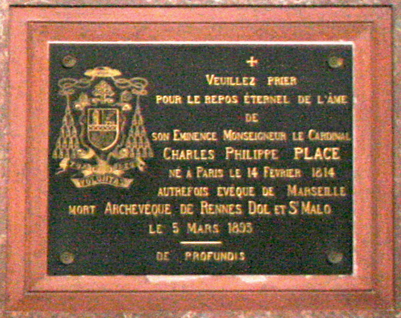 Plaque commémorative du cardinal Charles Philippe Place, dans la cathédrale Saint-Pierre de Rennes.